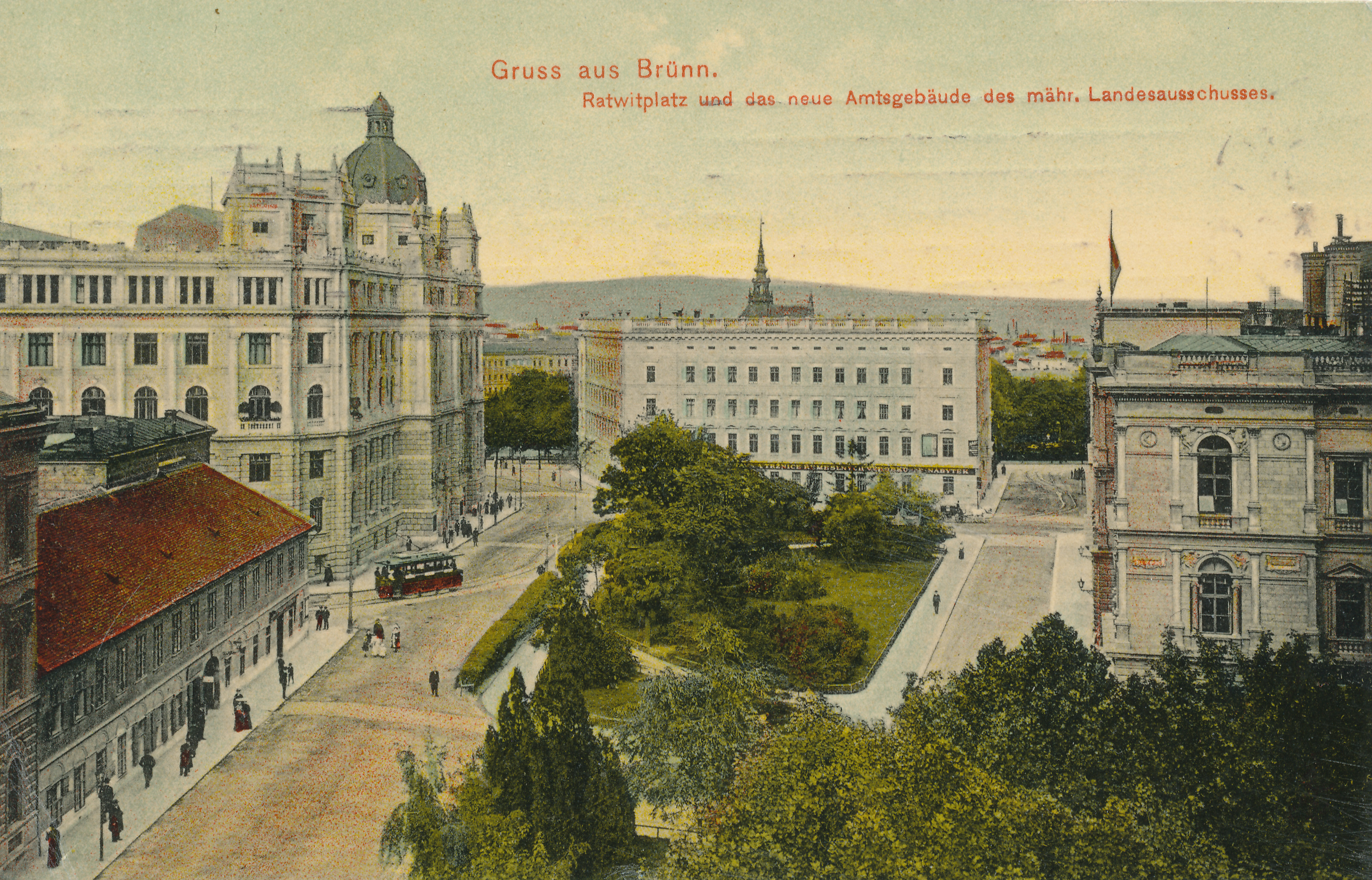 Raduitovo náměstí v roce 1908. Vlevo je tehdy nová úřední budova moravského zemského výboru, vpravo zemská sněmovna v Brně. Pohlednice, vydal Ascher & Redlich, Brno 1908. Pohlednice prošlá poštou v roce 1908. Vpravo je zachycena část zemské sněmovny postavené v letech 1875-1878. Vlajka na stožáru na její střeše by mohla představovat červenožlutou bikolóru. Na dochovaných fotografiích budovy zemského sněmu jsou ovšem často vidět jen prázdné stožáry.